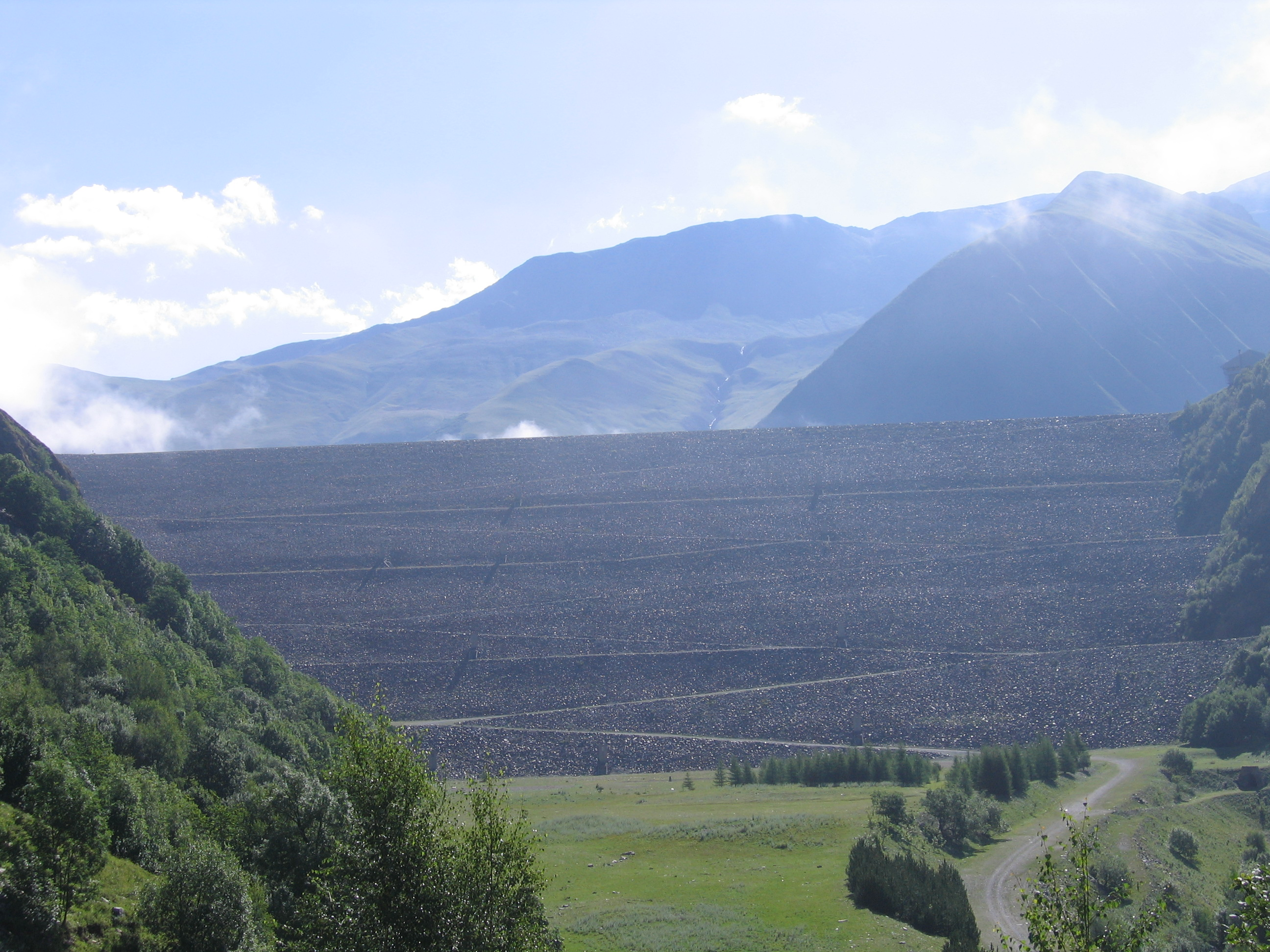 Le barrage de Grand'Maison est situé en France, en région Auvergne-Rhône-Alpes, dans le département de l'Isère.